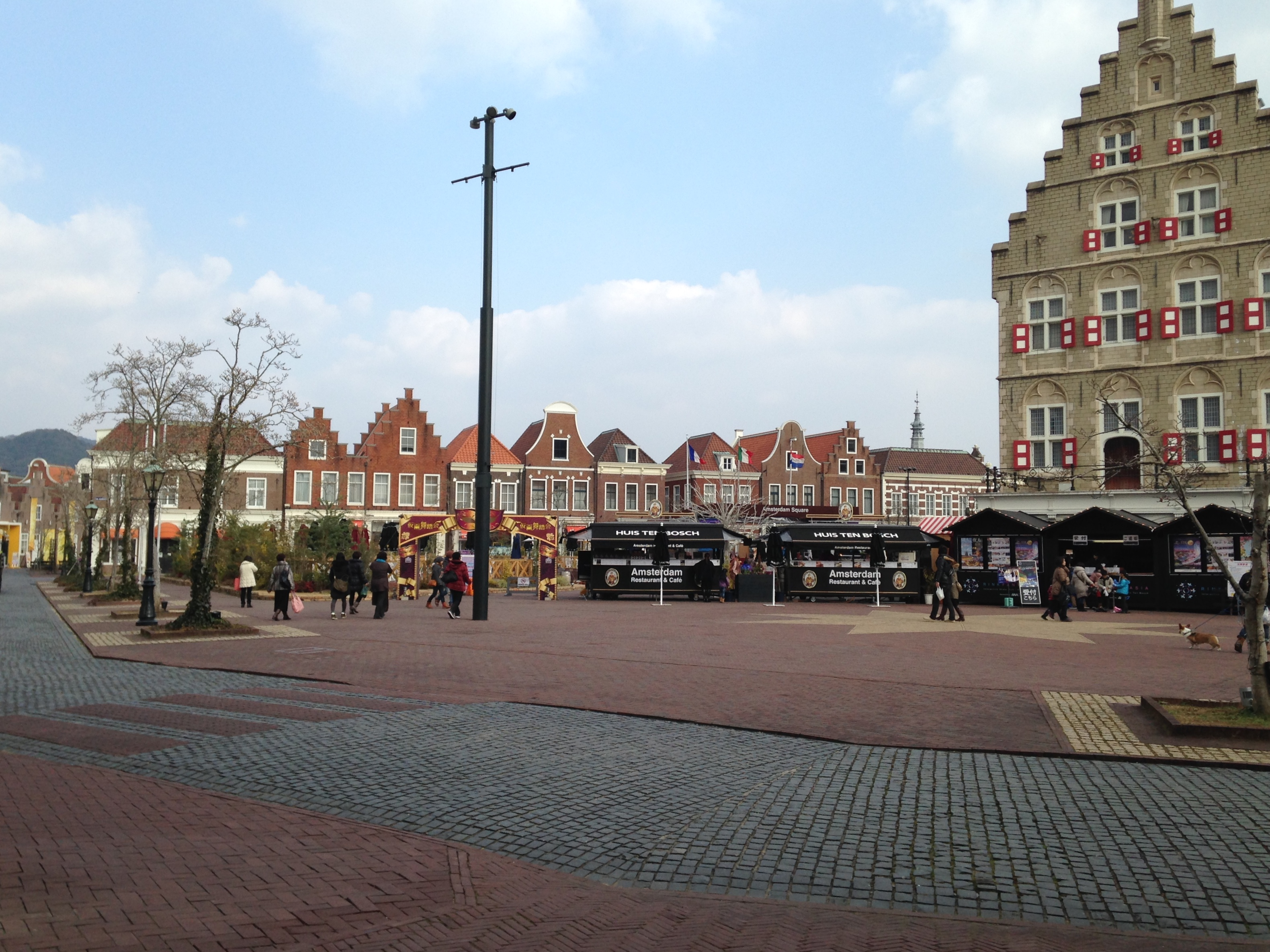 ハウステンボス・アムステルダム広場